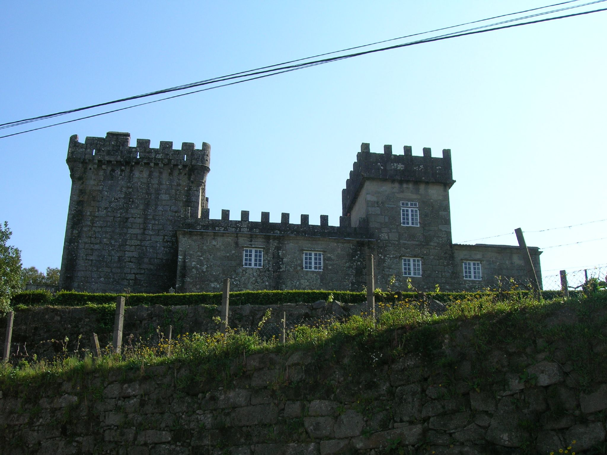 es: Castillo de Tebra. Construido en 1478 por Pedro Madruga, fue destruido posteriormente por orden de los Reyes Católicos, para levantar en los años siguiente y por orden de Juana la Loca, una torre que sustituyera al entramado defensivo, así como el resto de las dependencias. En la actualidad es de propiedad privada. gl: Castelo de Tebra. Construído en 1478 por Pedro Madruga, foi destruído posteriormente por orde dos Reis Católicos, para ergueren nos anos seguintes e por orde de Xoana a Tola, unha torre que substituíse o entramado defensivo, así coma o resto das dependencias. Na actualidade é de propiedade privada.